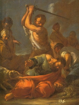 La obra representa la decapitación del apóstol San Pablo, que según la tradición fue ejecutado en Roma durante la persecución del emperador Nerón.